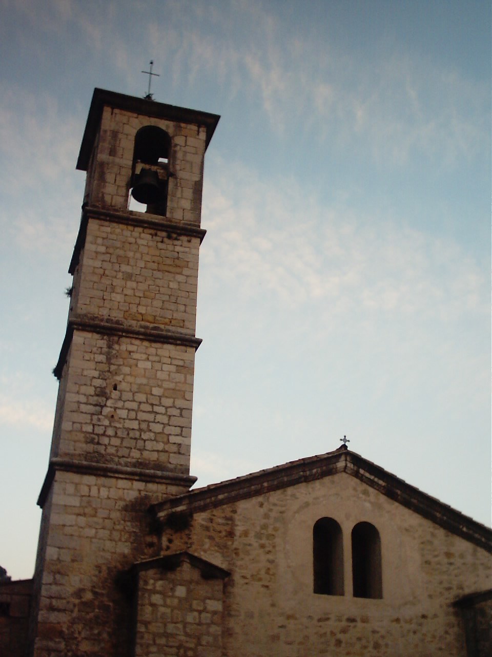 Author: Benjamin Sonntag fr: L'Église de Valbonne, Alpes Maritimes, France.